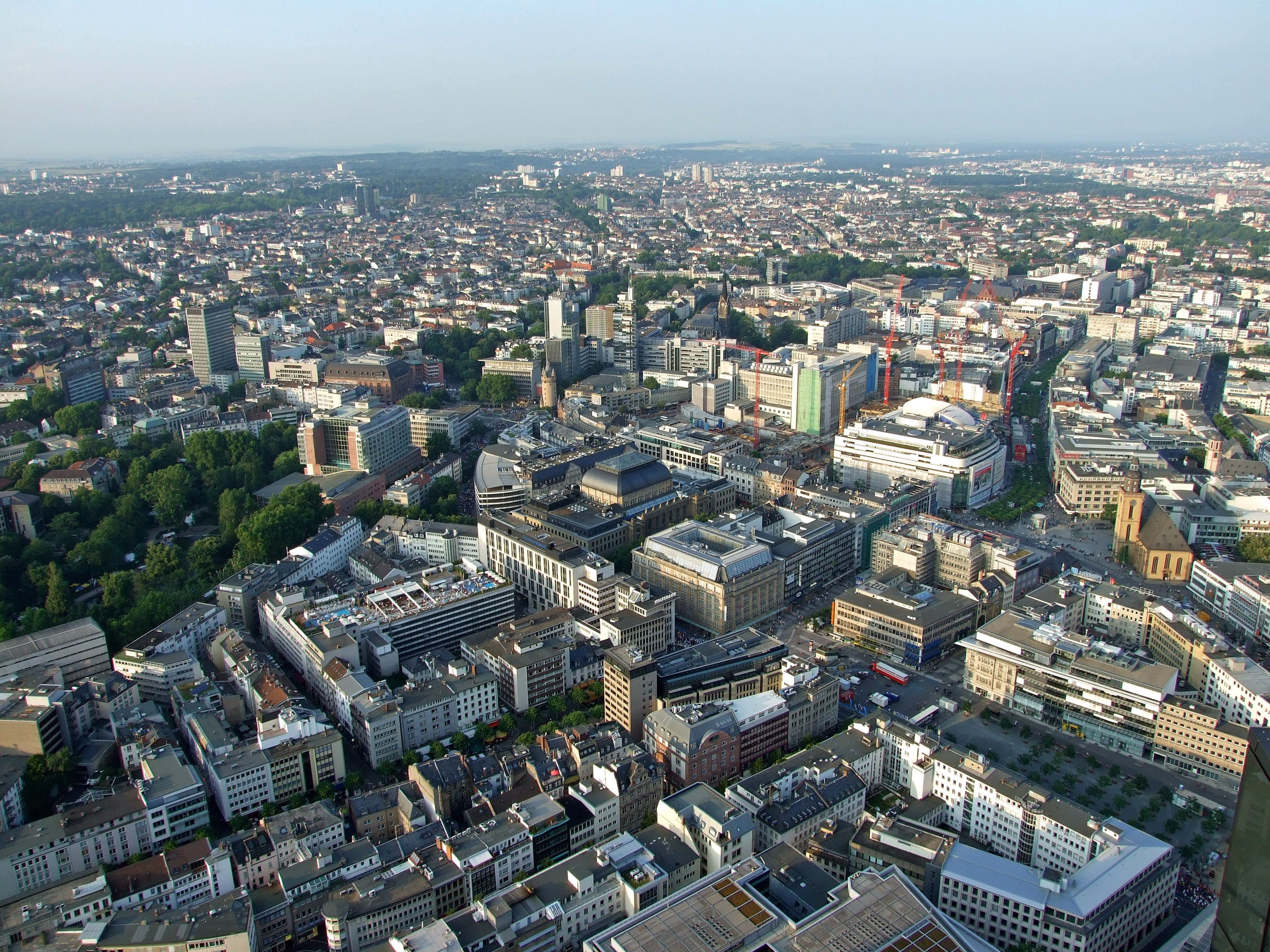 Wallanlagen, Nordteil zwischen Opernplatz und Zoo in Ffm